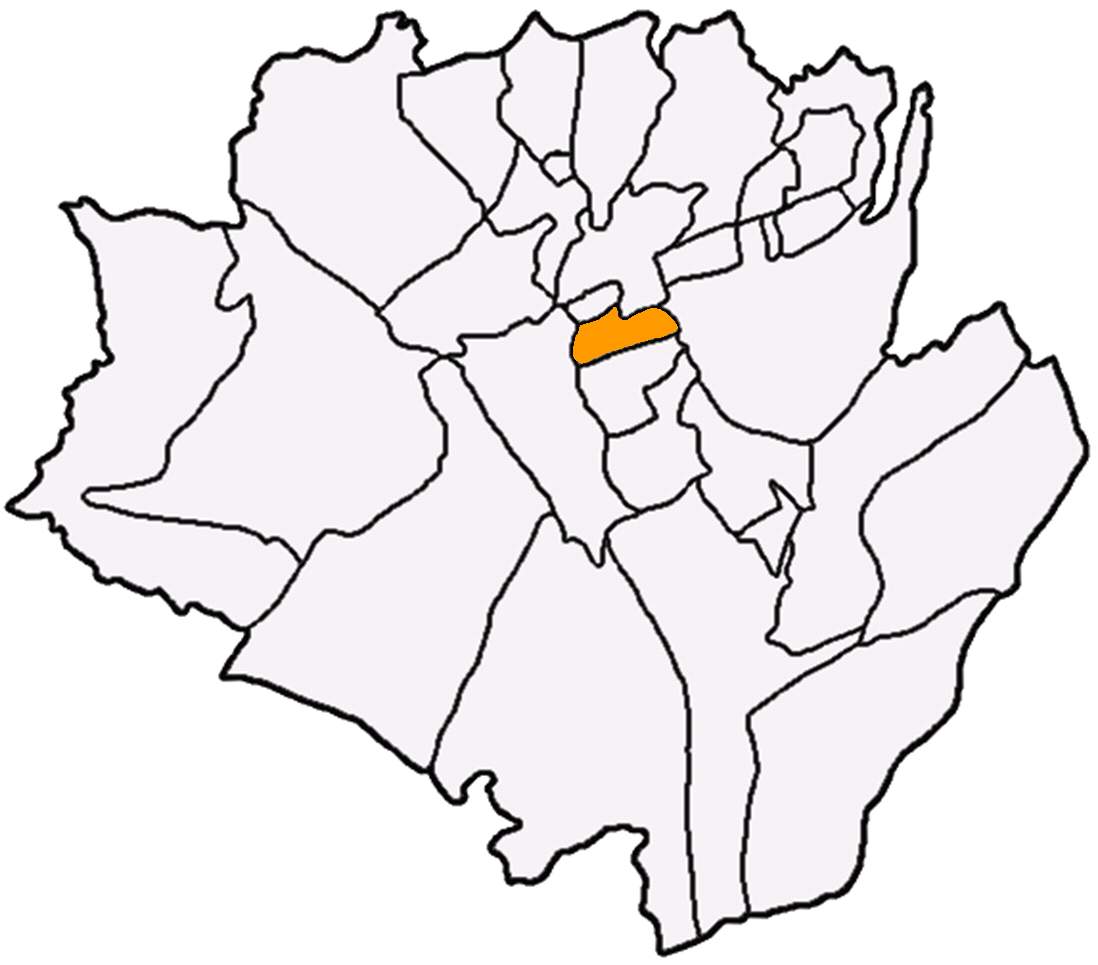 龍星里在龍潭區 (台灣)的位置